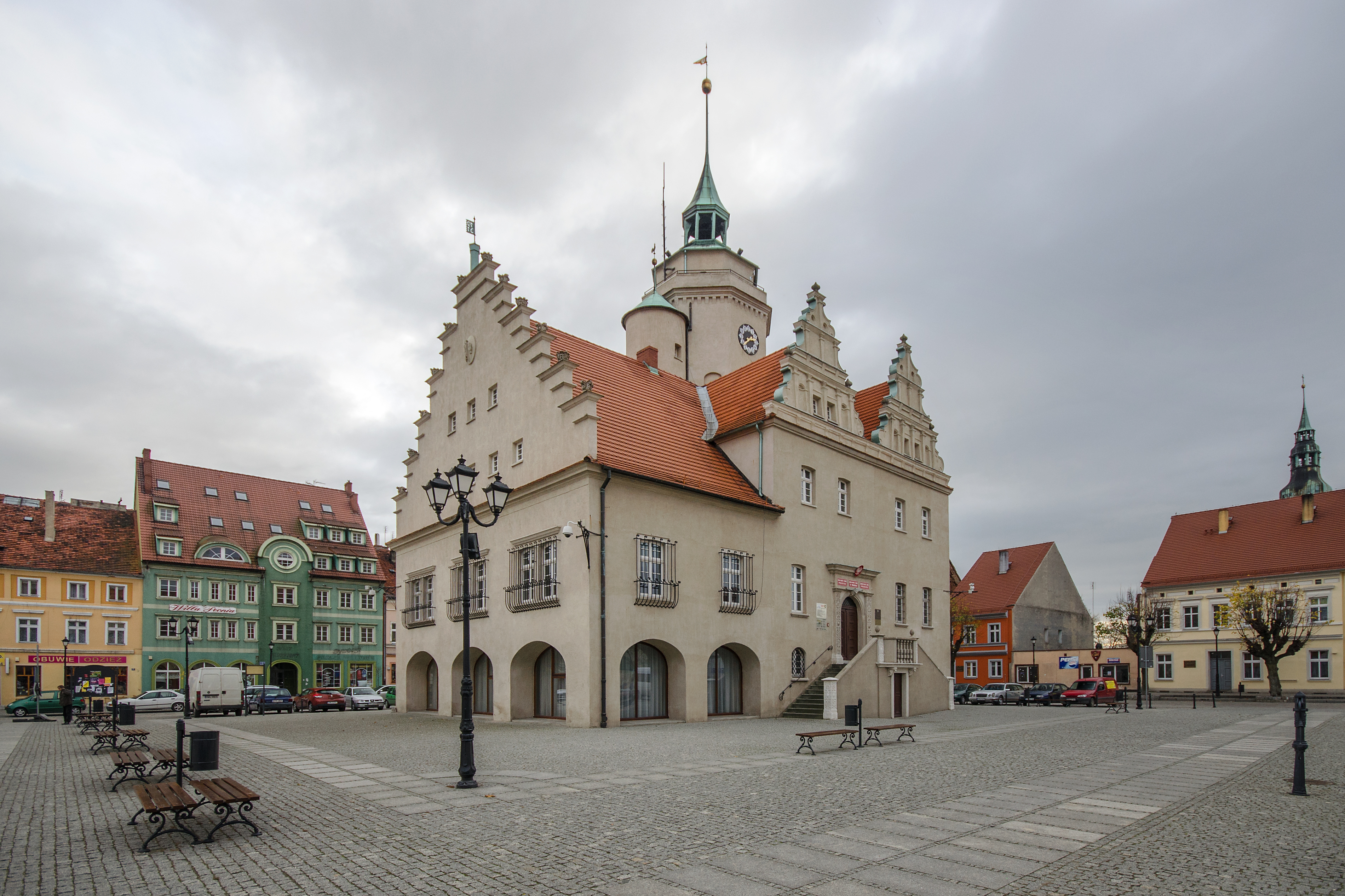 Prusice, ratusz, ok. 1600, XVIII